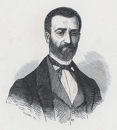 Gaspare Cavallini